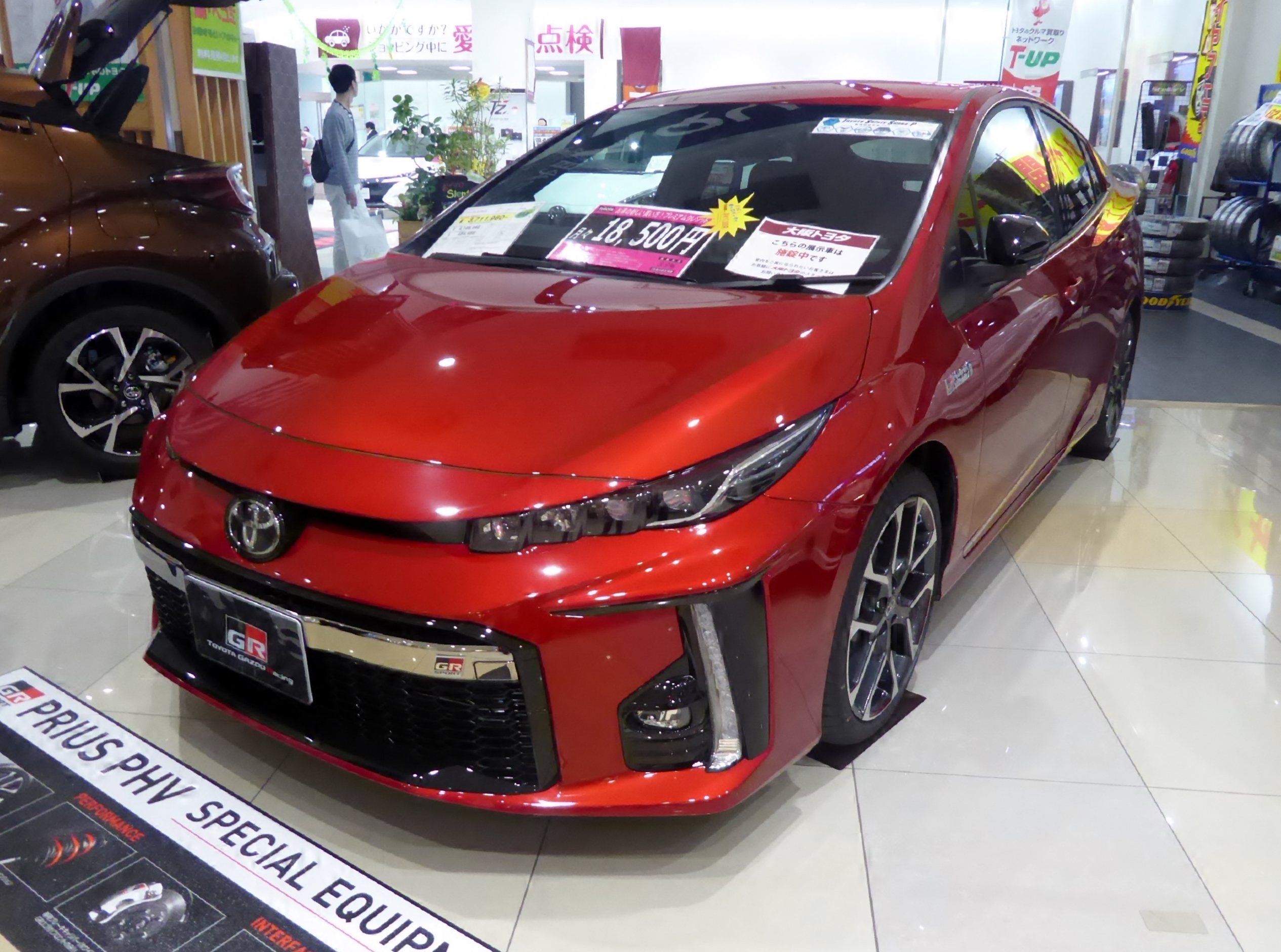 赤いDLA-ZVW52-VLJBXE型トヨタ・プリウスPHV S"GR SPORT"をフロントから撮影。